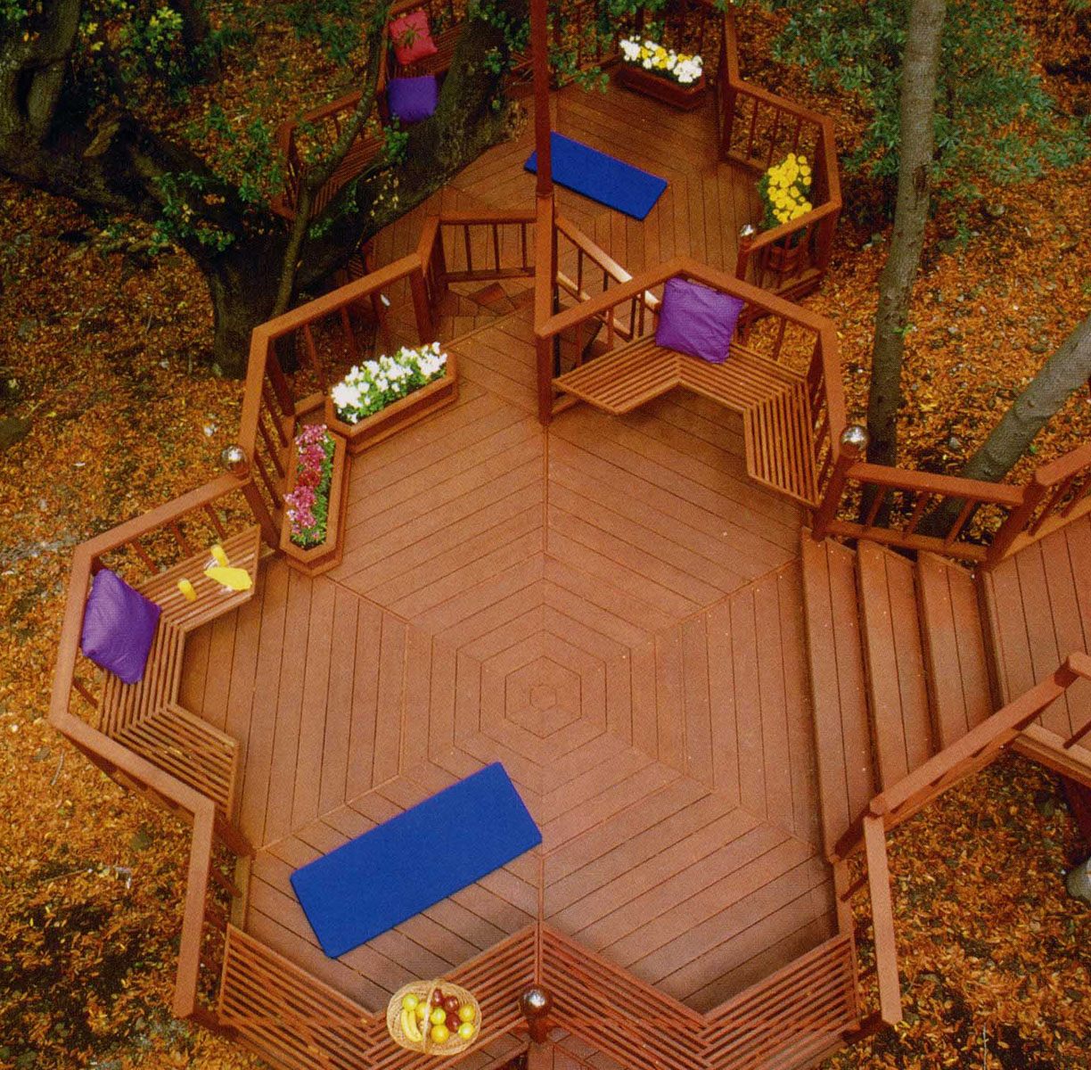 многоярусная терраса сложной формы